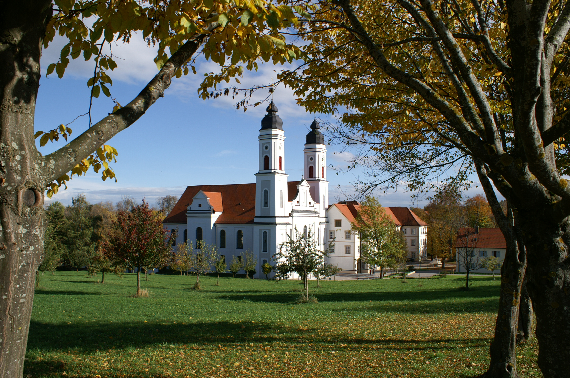 Klosterkirche Irsee